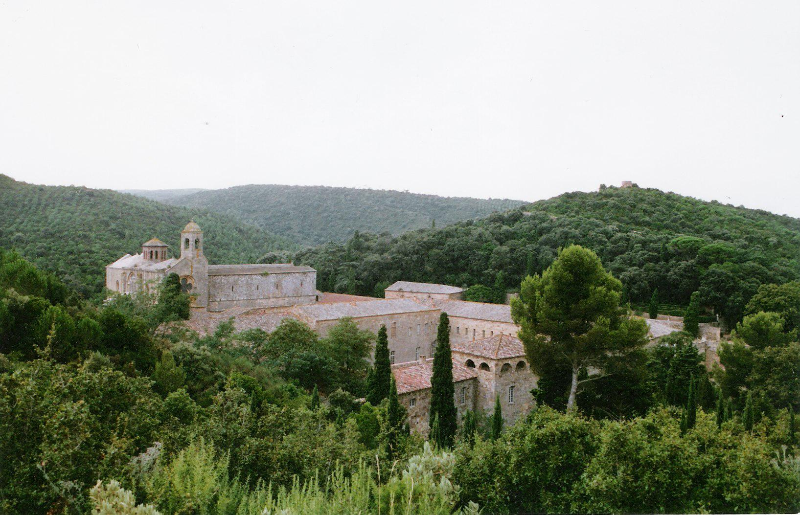 Abbaye Sainte-Marie de Fontfroide (Aude, région Languedoc-Roussilon, France - 2004)